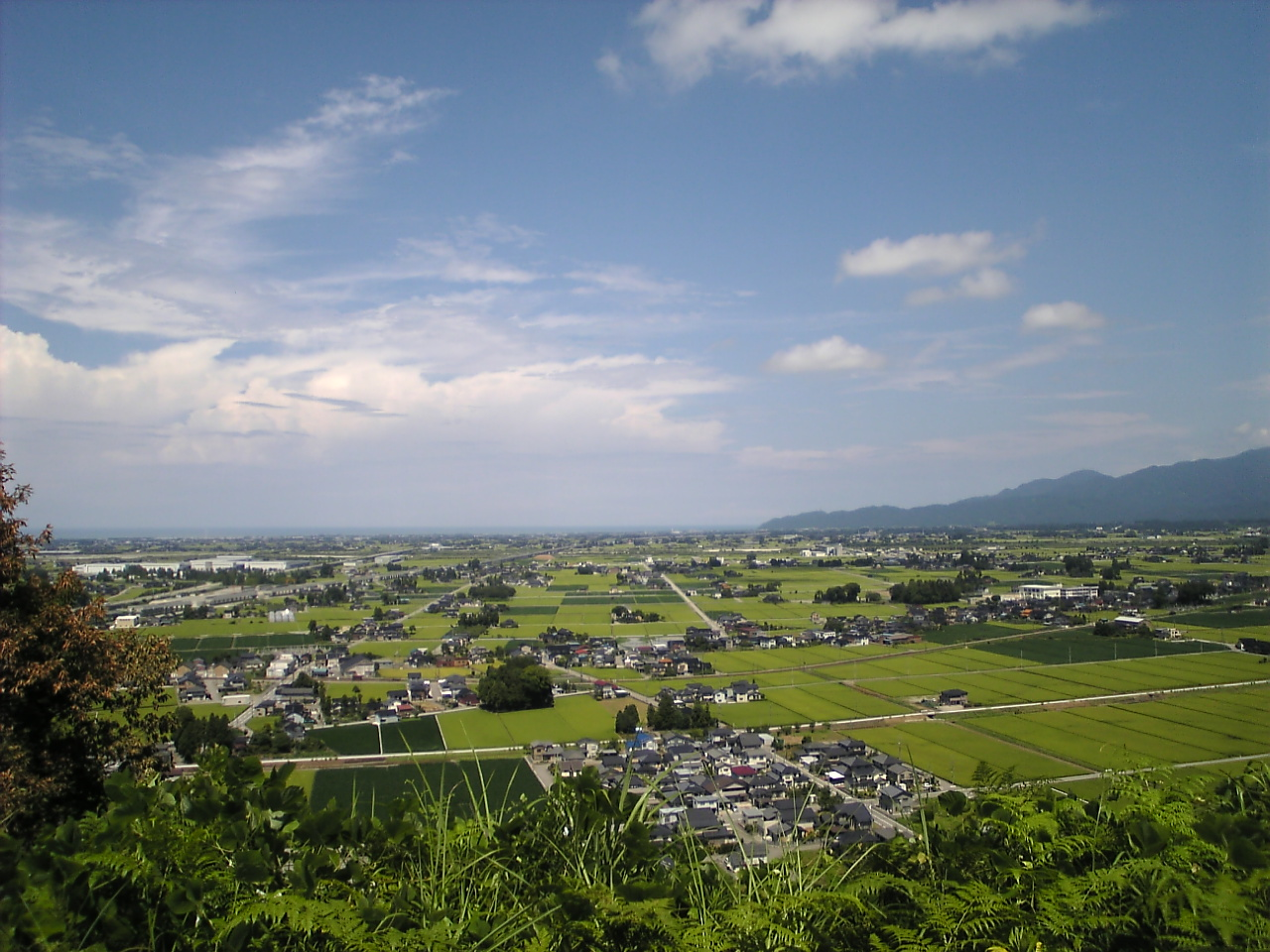 黒部扇状地